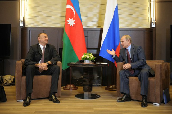 Владимир Путин с Президентом Азербайджана Ильхамом Алиевым.